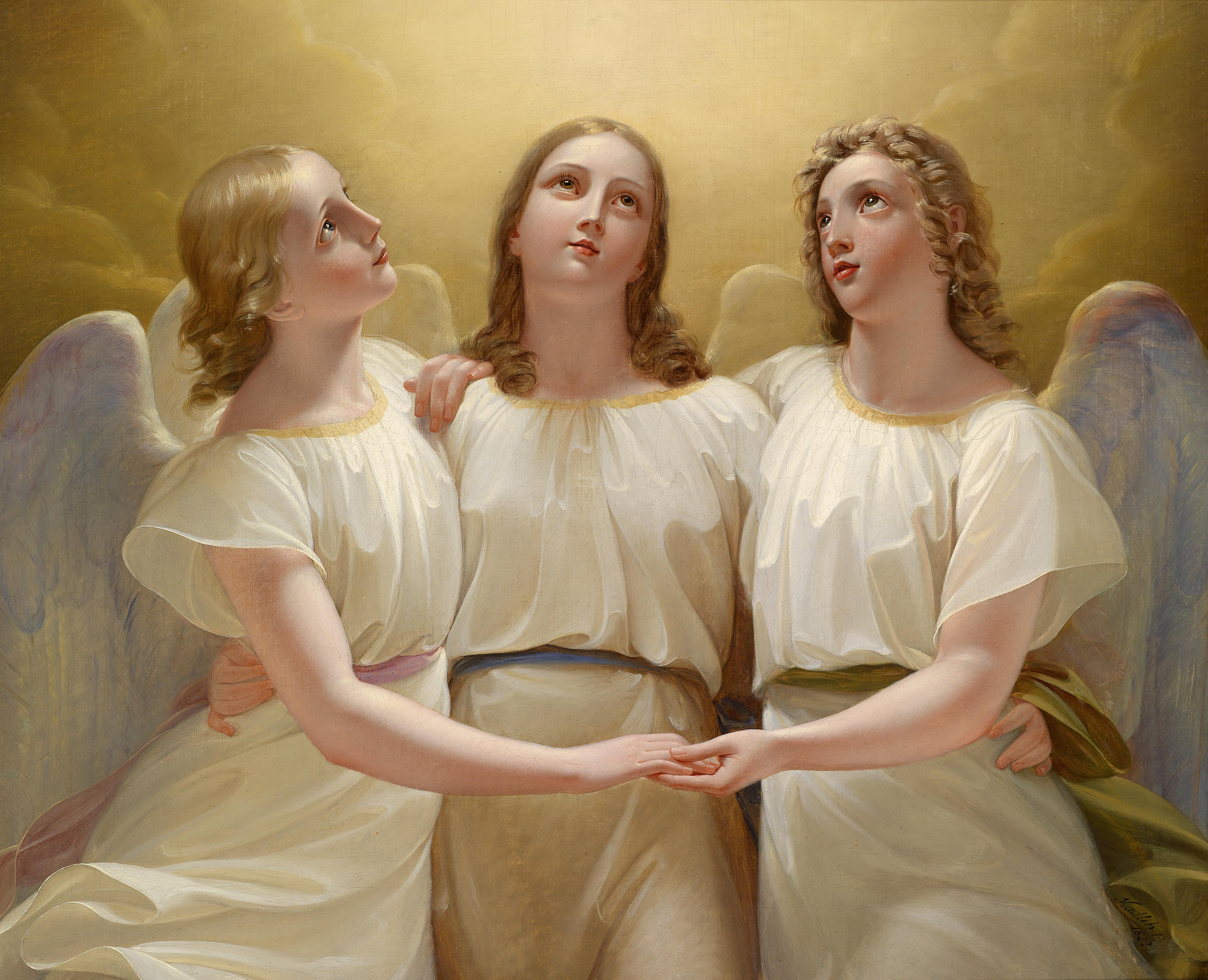 Drei Schutzengellabel QS:Lde,"Drei Schutzengel"